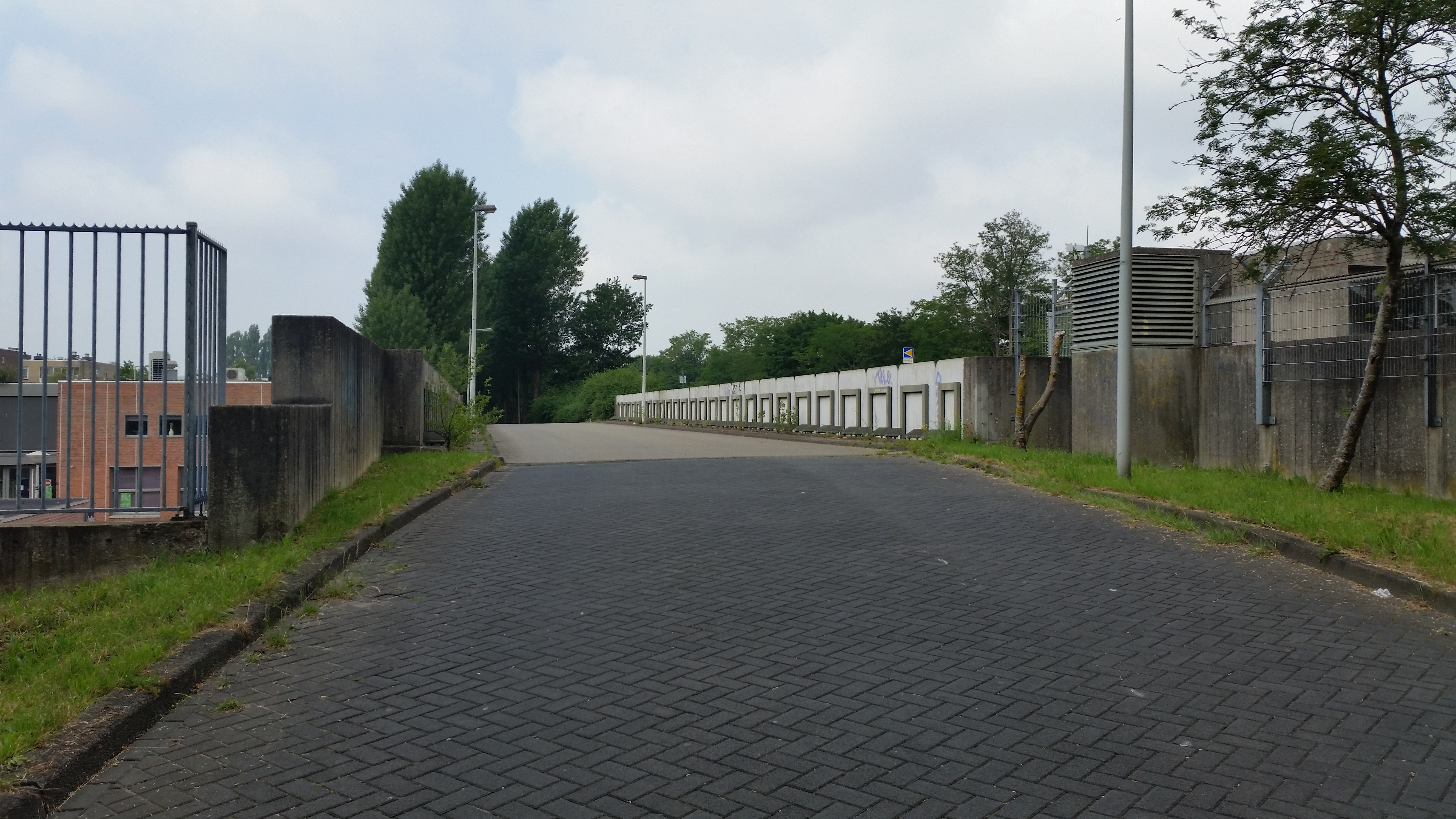 Impressie van brug 1373 in Amsterdam Zuidoost (juni 2020)